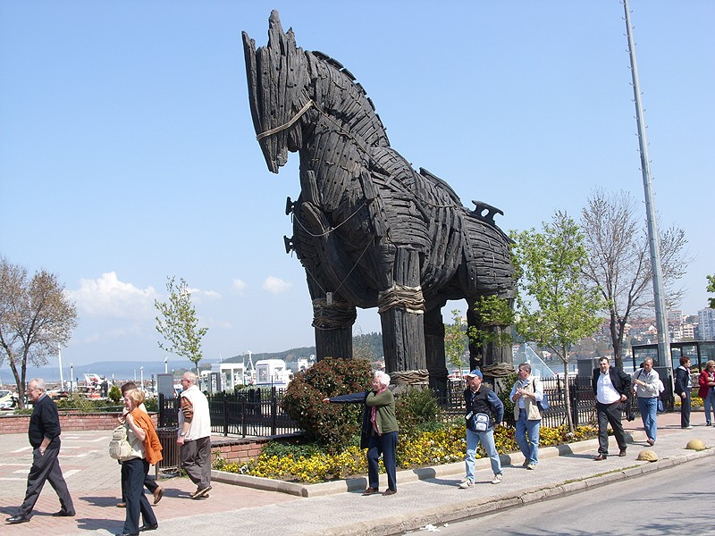 Canakkale - Cavallo di Troia